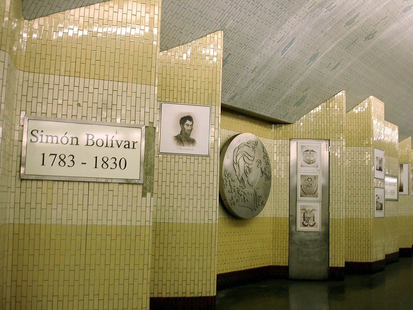 Station Bolivar, de la ligne 7bis du métro de Paris, France.